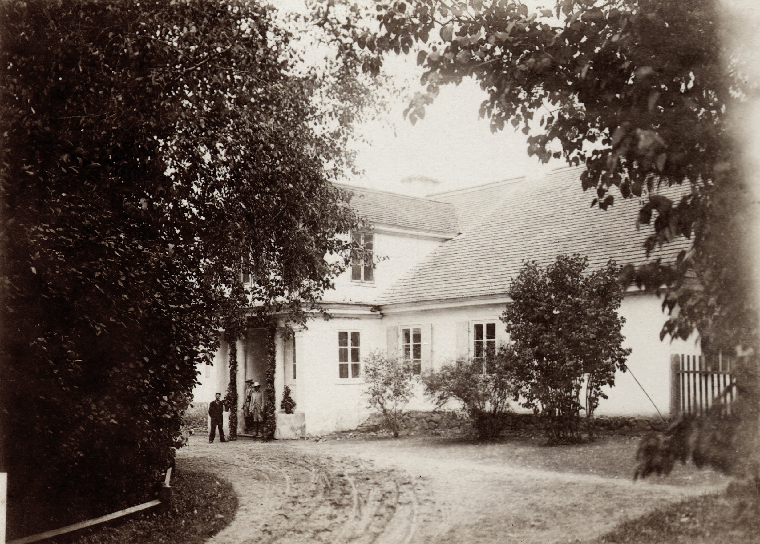 Veprių centrinių rūmų vaizdas XIX a. viduryje. Vaitkuškio valdytojo Stanislovo Kosakovskio fotografija. Tai yra seniausias žinomas centrinių rūmų vaizdas. Šie rūmai neišlikę, nugriauti po II p. k.